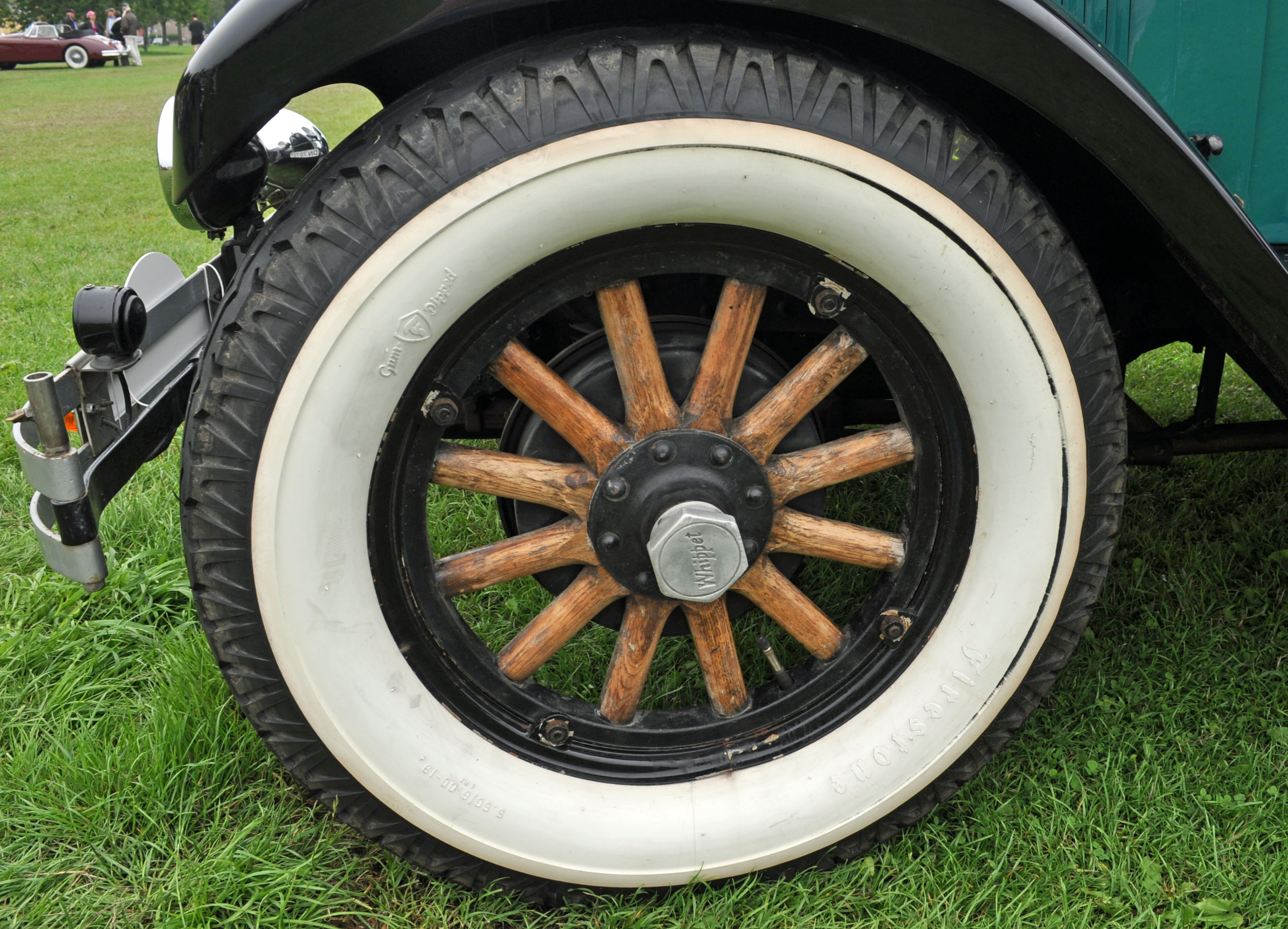 Das Foto zeigt einen Teilnehmer der Classic-Car-Race "Bornholm Rundt 2012" im Juli 2012 auf Bornholm, Dänemark. Vorderrad am Whippet Overland